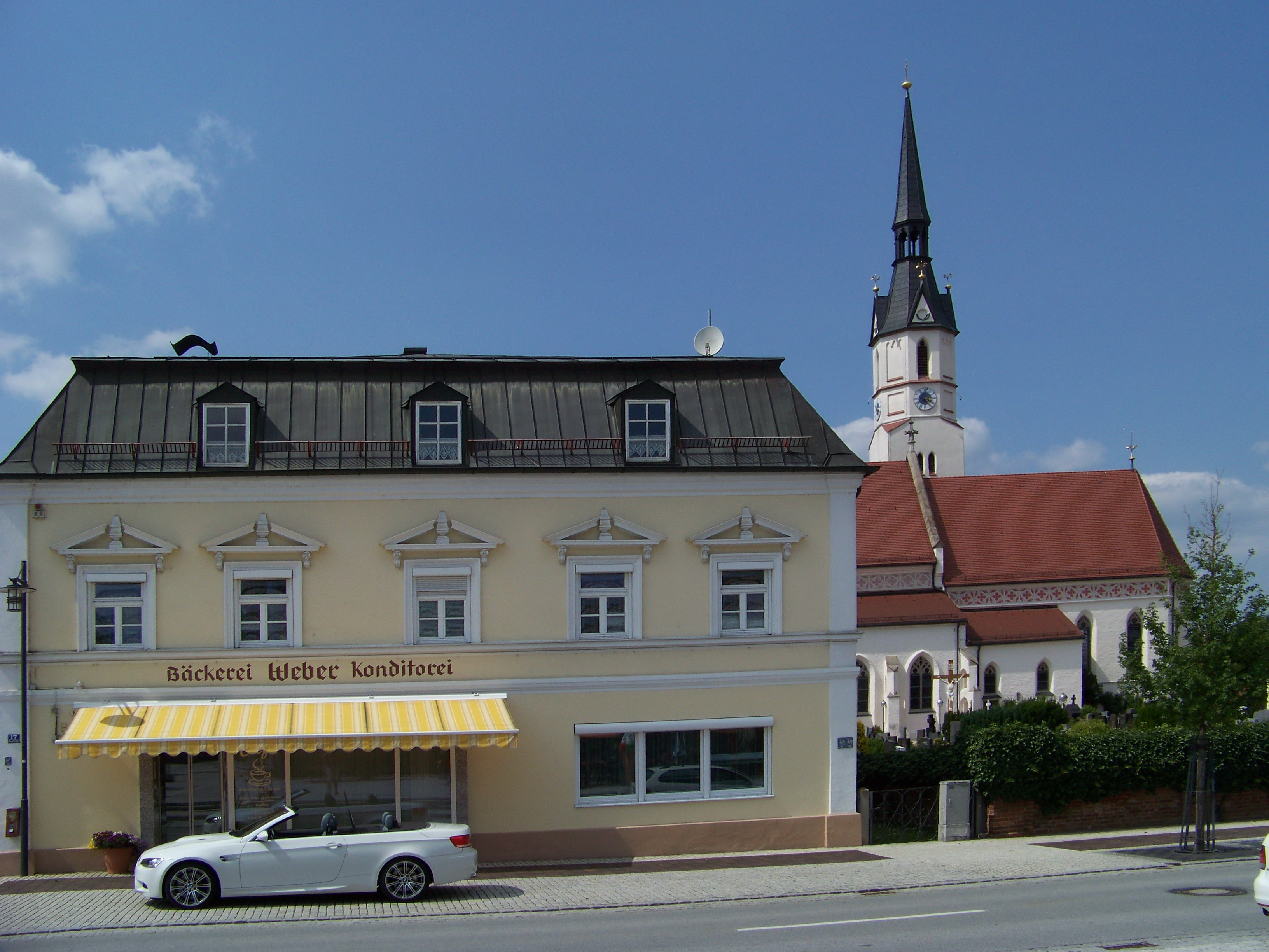 Marklkofen, Hauptstraße 17. Wohn- und Geschäftshaus, zweigeschossiger Mansarddachbau mit klassizisierender Fassadengestaltung, um 1870/80.